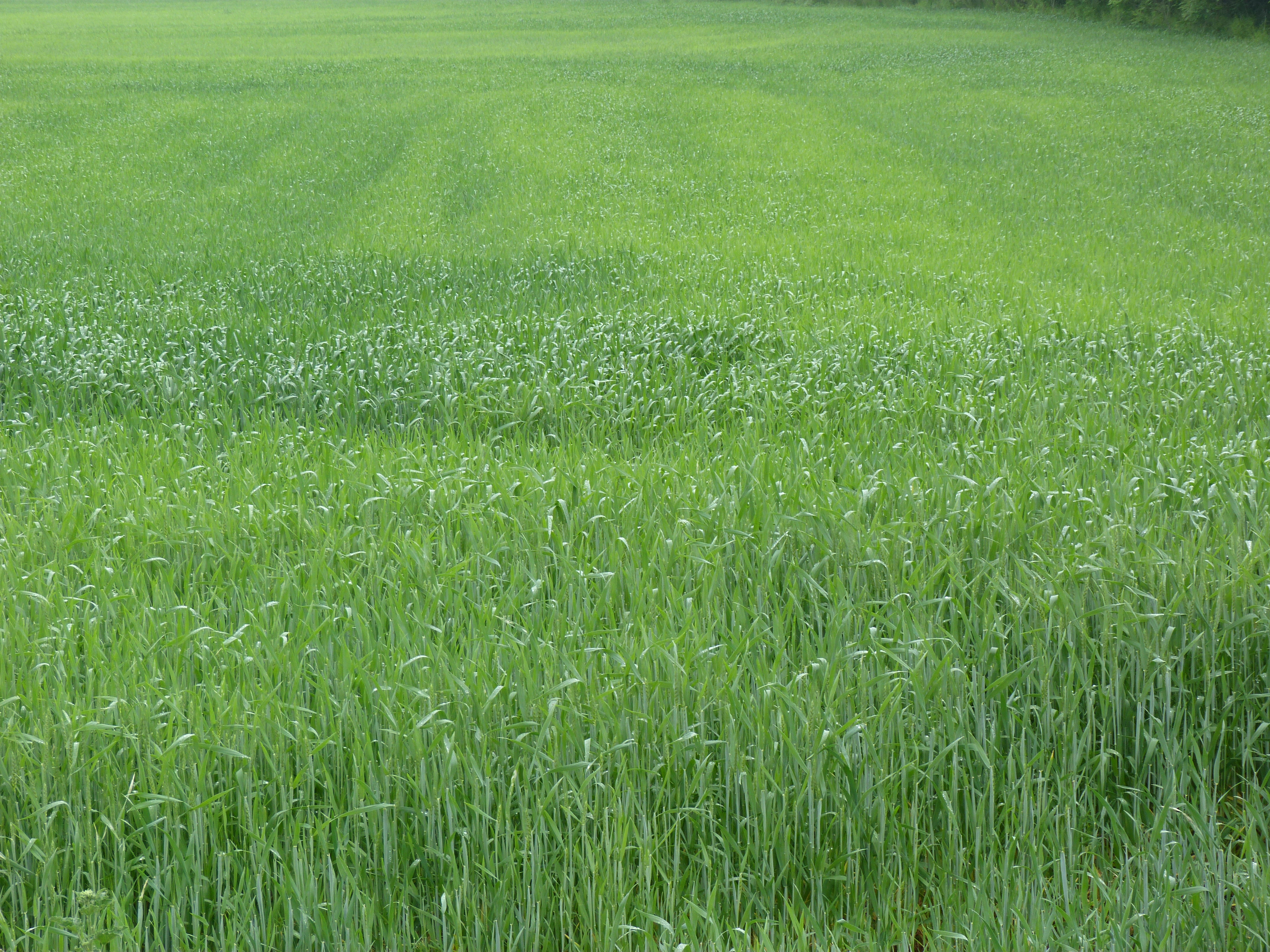 A felvétel 2013. Május 15 –én készült Vásárosnaményben. Búzaföld.